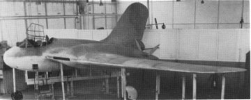 Attrappe des Flugzeugs Messerschmitt Me-329